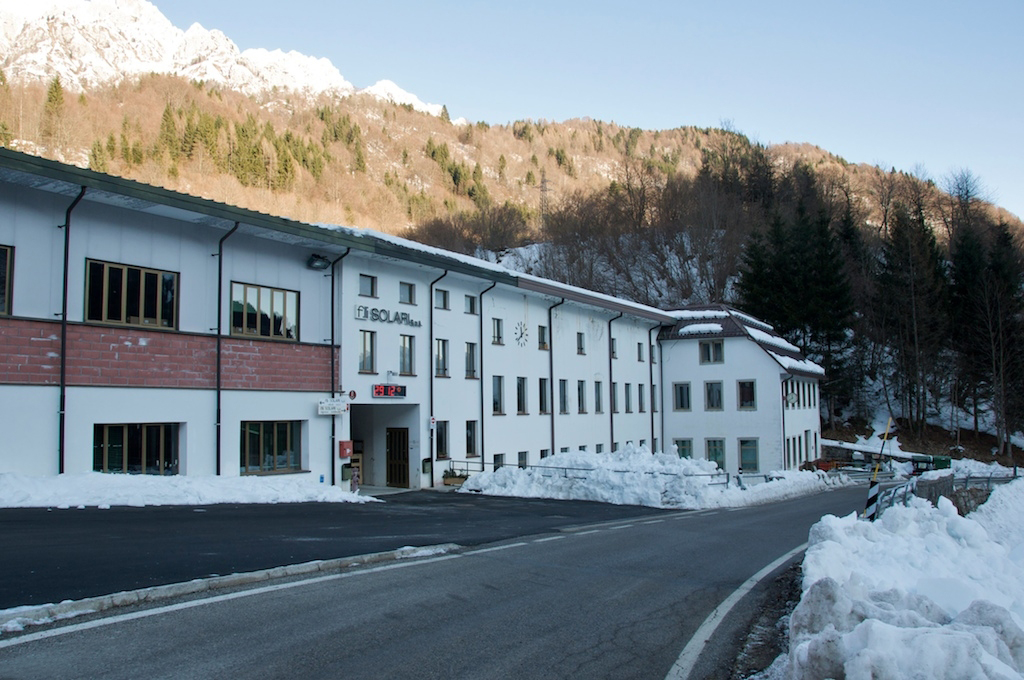 Furlan: La farie dai orlois Solari